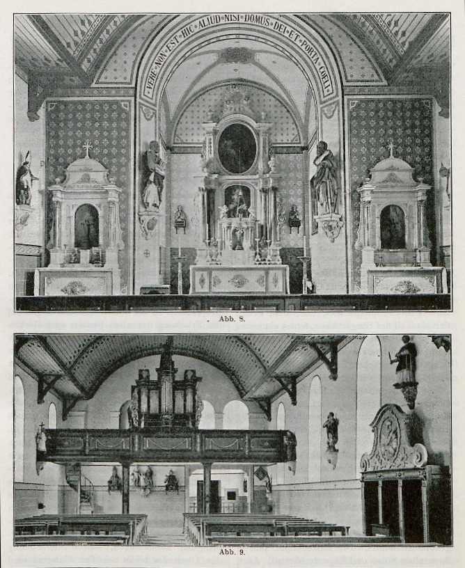 Ehemalige katholische St.-Augustinus-Kirche in Listernohl bei Attendorn. Blick durch das Kirchenschiff auf Altar und Orgel-Empore im Jahre 1911. In den 1960er Jahren wegen dem Bau der Biggetalsperre abgerissen.